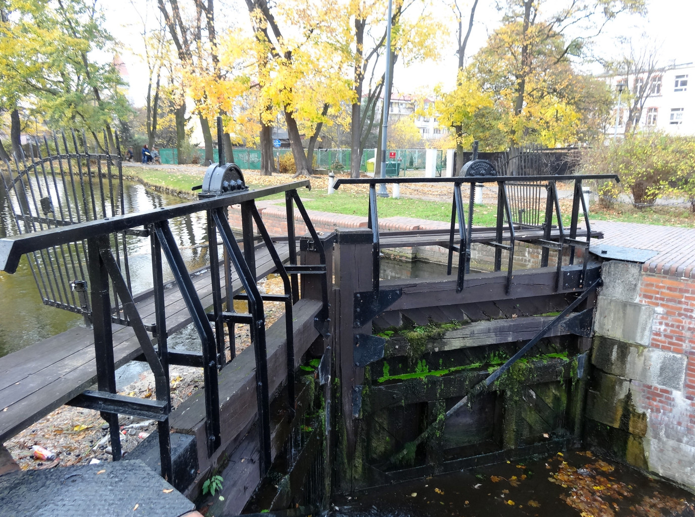 Śluza IV przy ul. Wrocławskiej w Bydgoszczy na Starym Kanale Bydgoskim